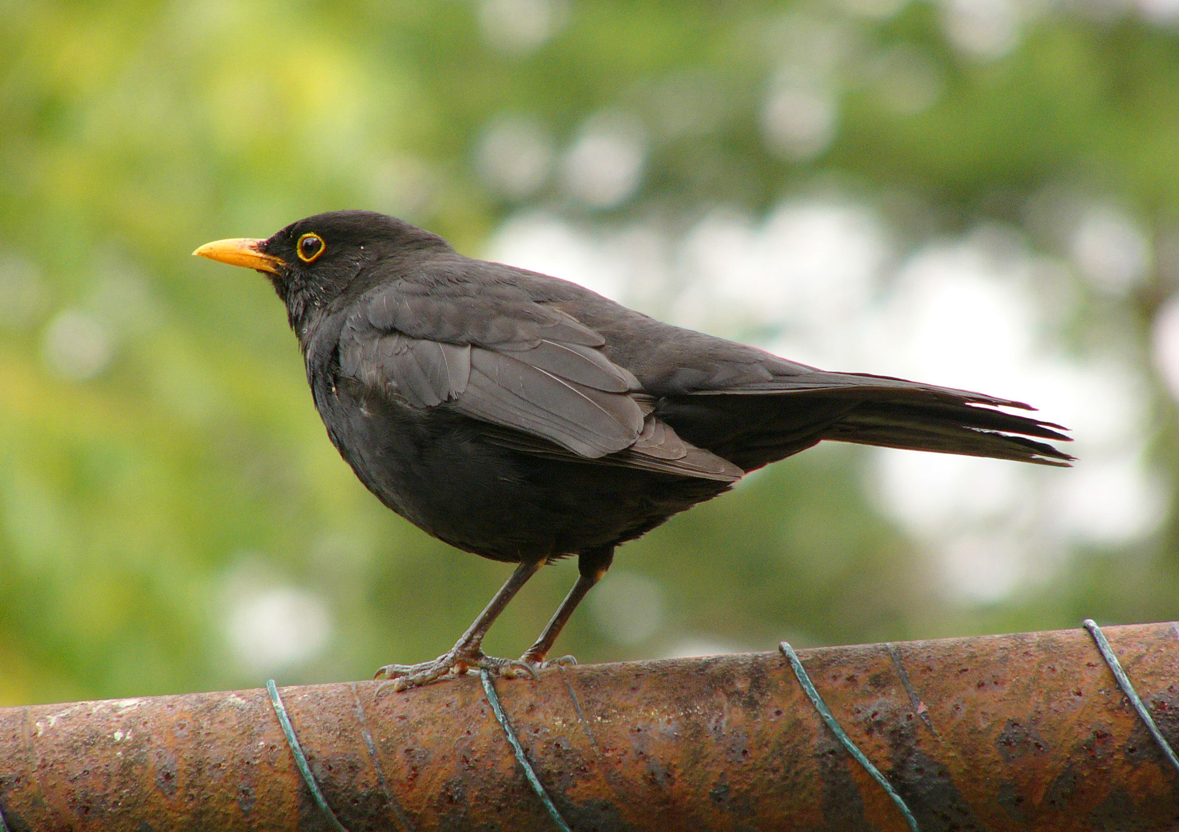 Dospělý samec kosa černého, Zoo Svatý kopeček, Olomouc